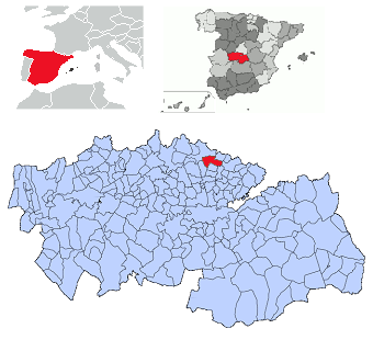 El Viso de San Juan en la provincia de Toledo